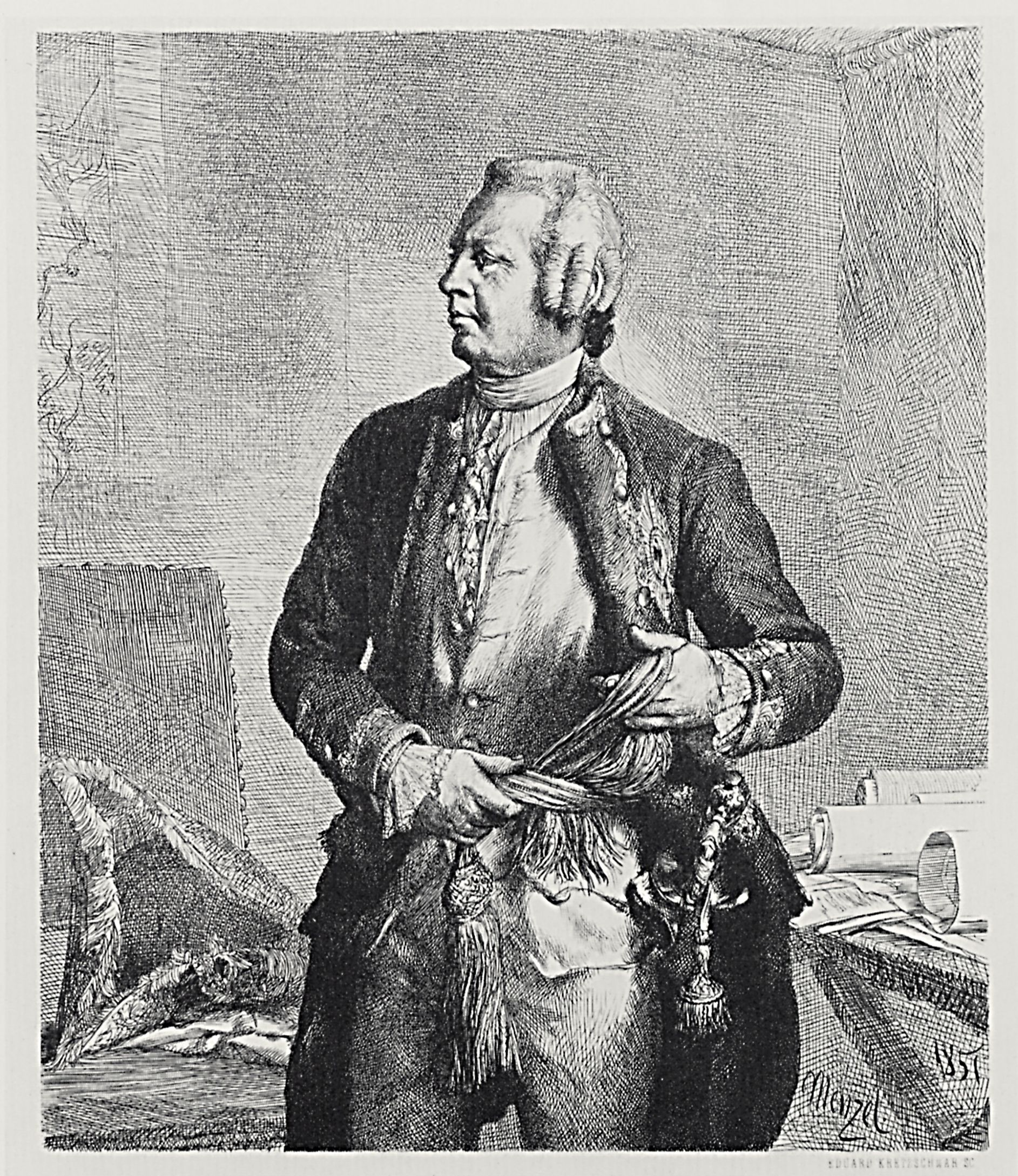 Bild Hans Karl von Winterfeldt (1707–1757)